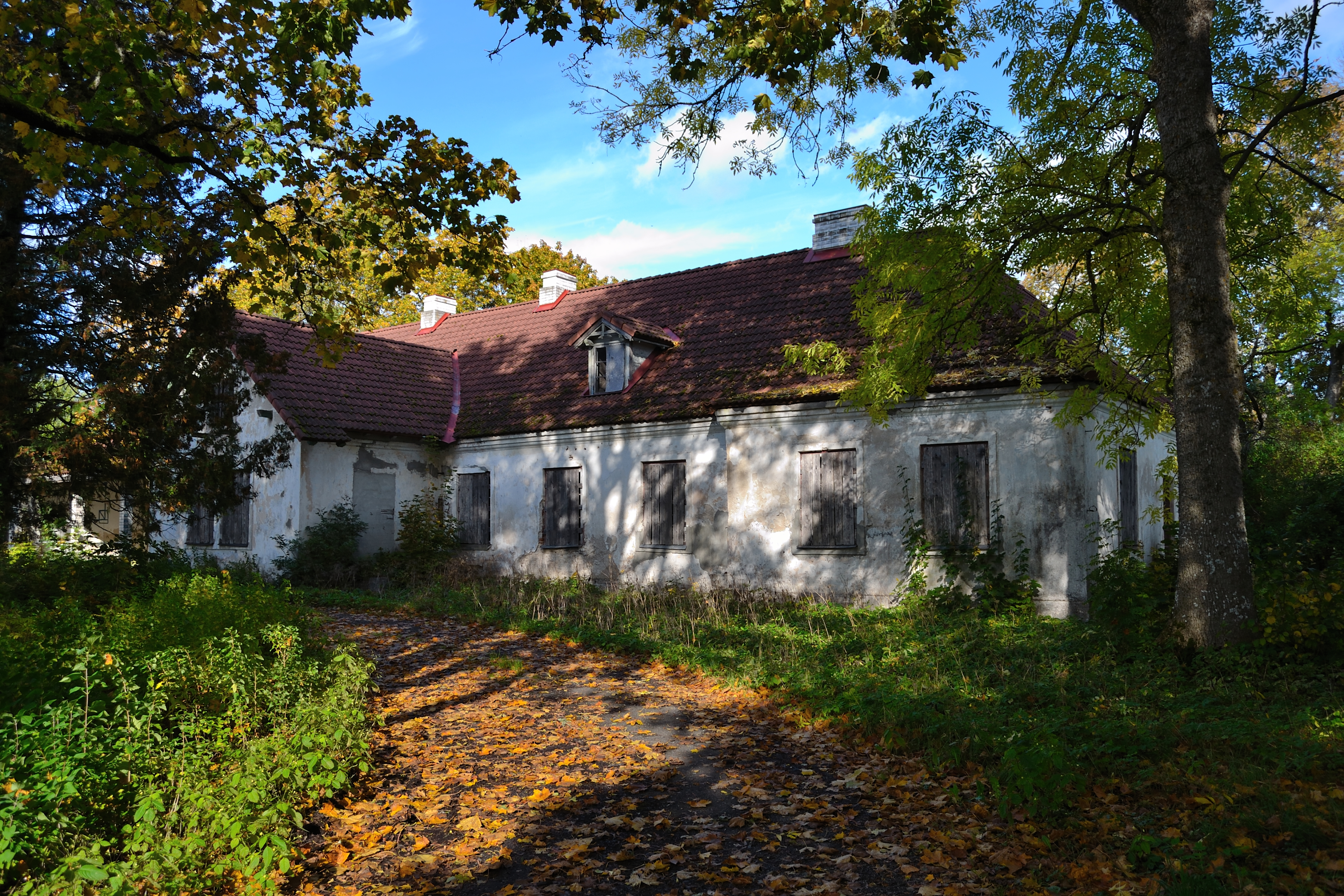 Juuru mõisa peahoone